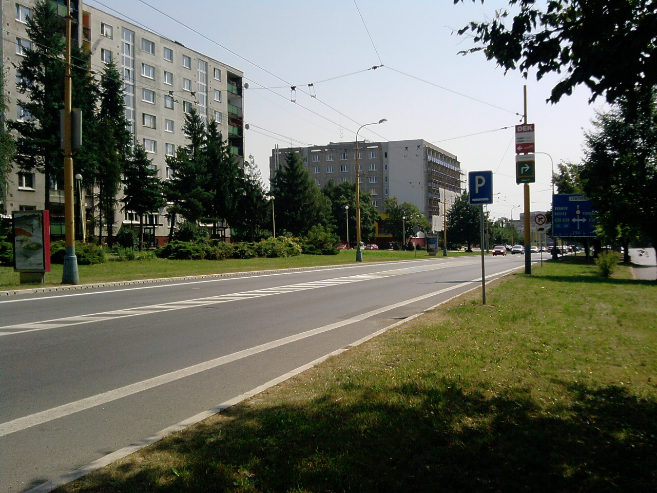 Ulica Sabinovská, sídlisko Mier, Prešov